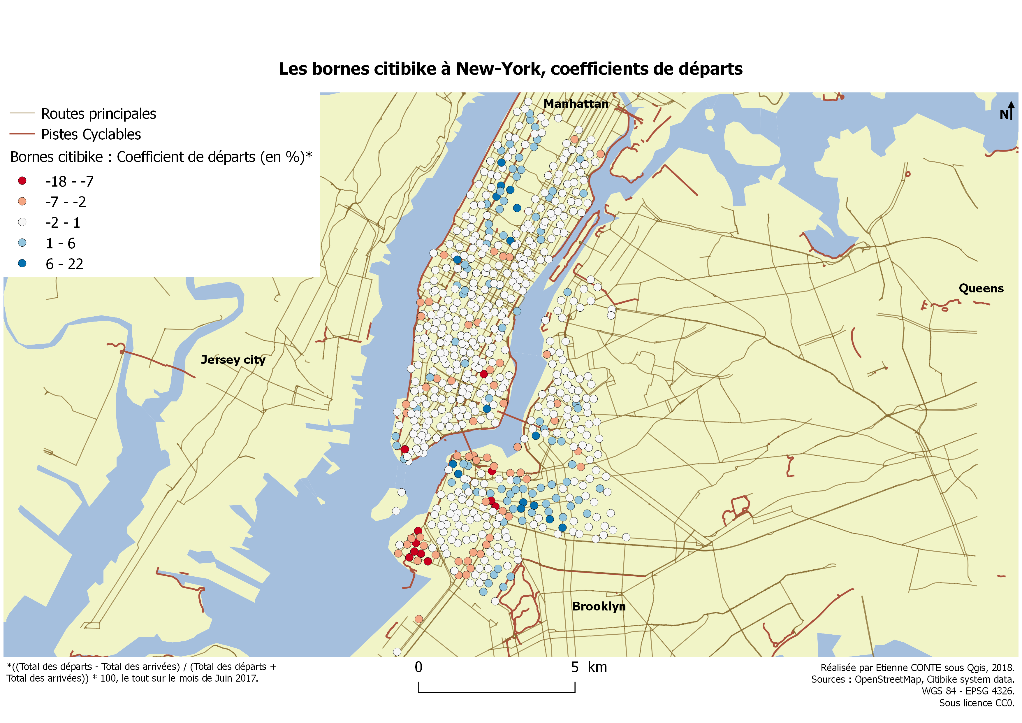 La formule utilisée pour créer cette carte est la suivante : ((Total départs - Total arrivées) / (Total départs + Total arrivées))*100. Si le chiffre est positif il y a un excédent de départs par rapport aux arrivées, si le chiffre est négatif il y a un excédent d'arrivées par rapport aux départs. Le pourcentage permet de mieux se rendre compte des écarts.